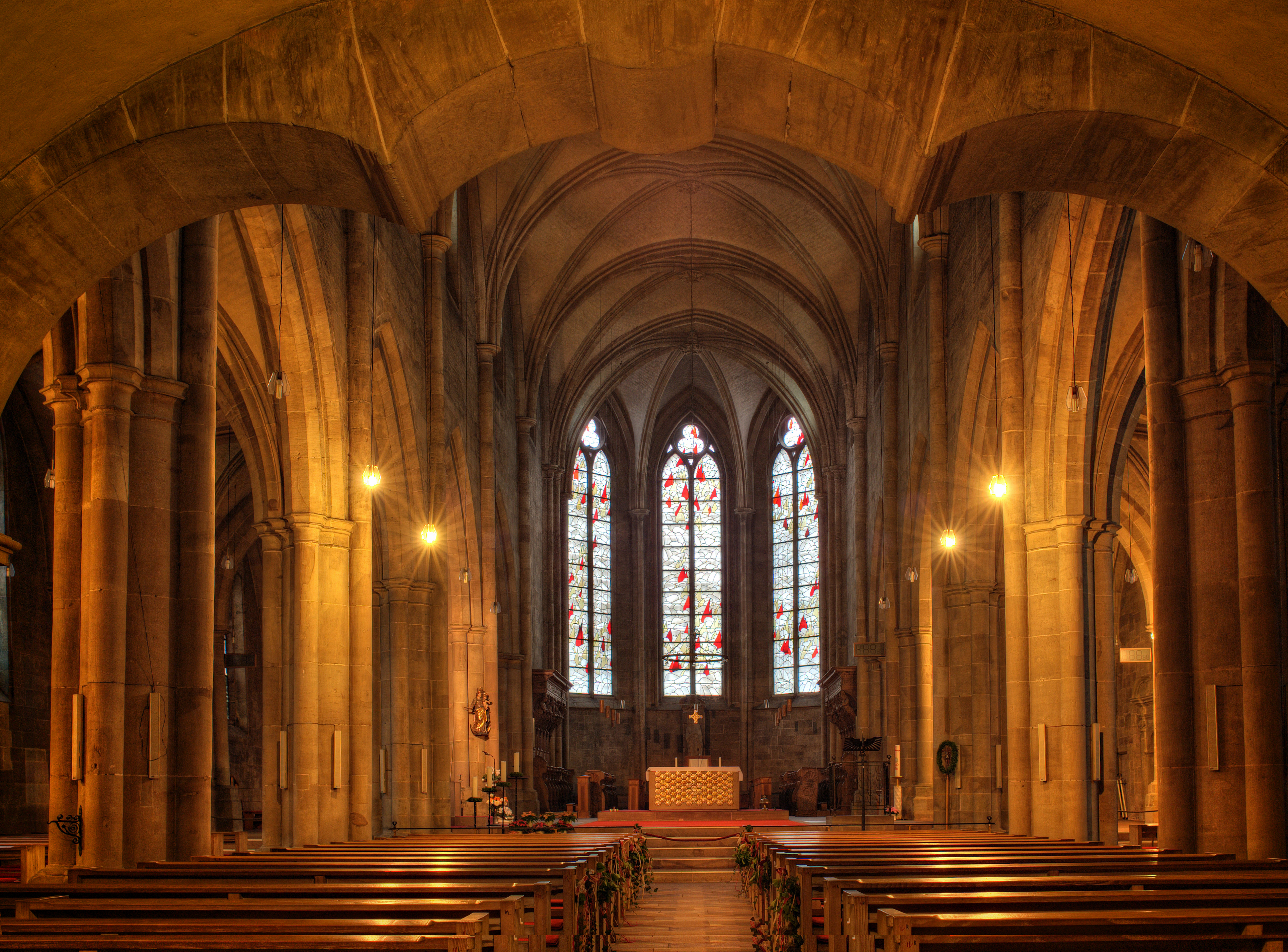 Kirchenschiff